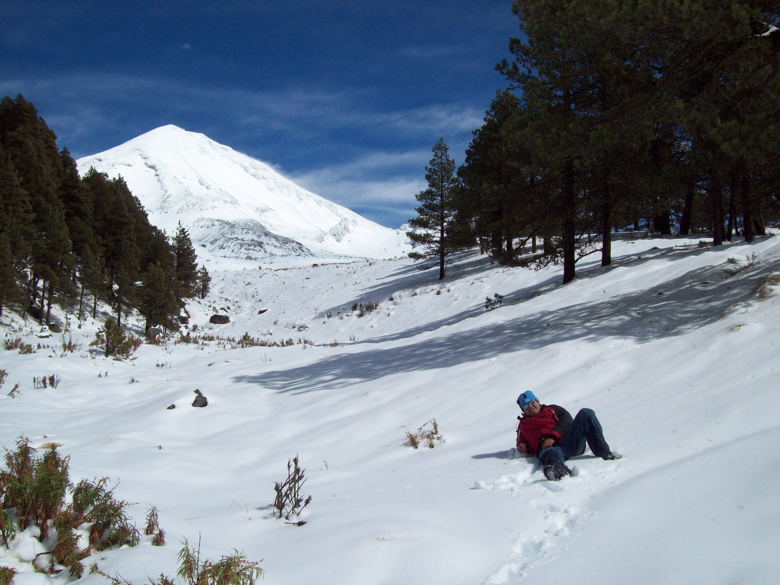 Increible Nevada provocada por el frente frío 22 y 23, en el Pico de Orizaba, México. Enero 17 de 2010